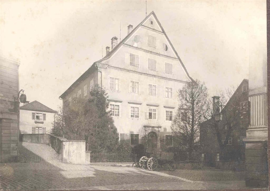 Das Palais Waldburg-Wolfegg in Bregenz im Jahr 1912, als es als Hauptsitz der Vorarlberger Landes- und Hypothekenbank genutzt wurde.